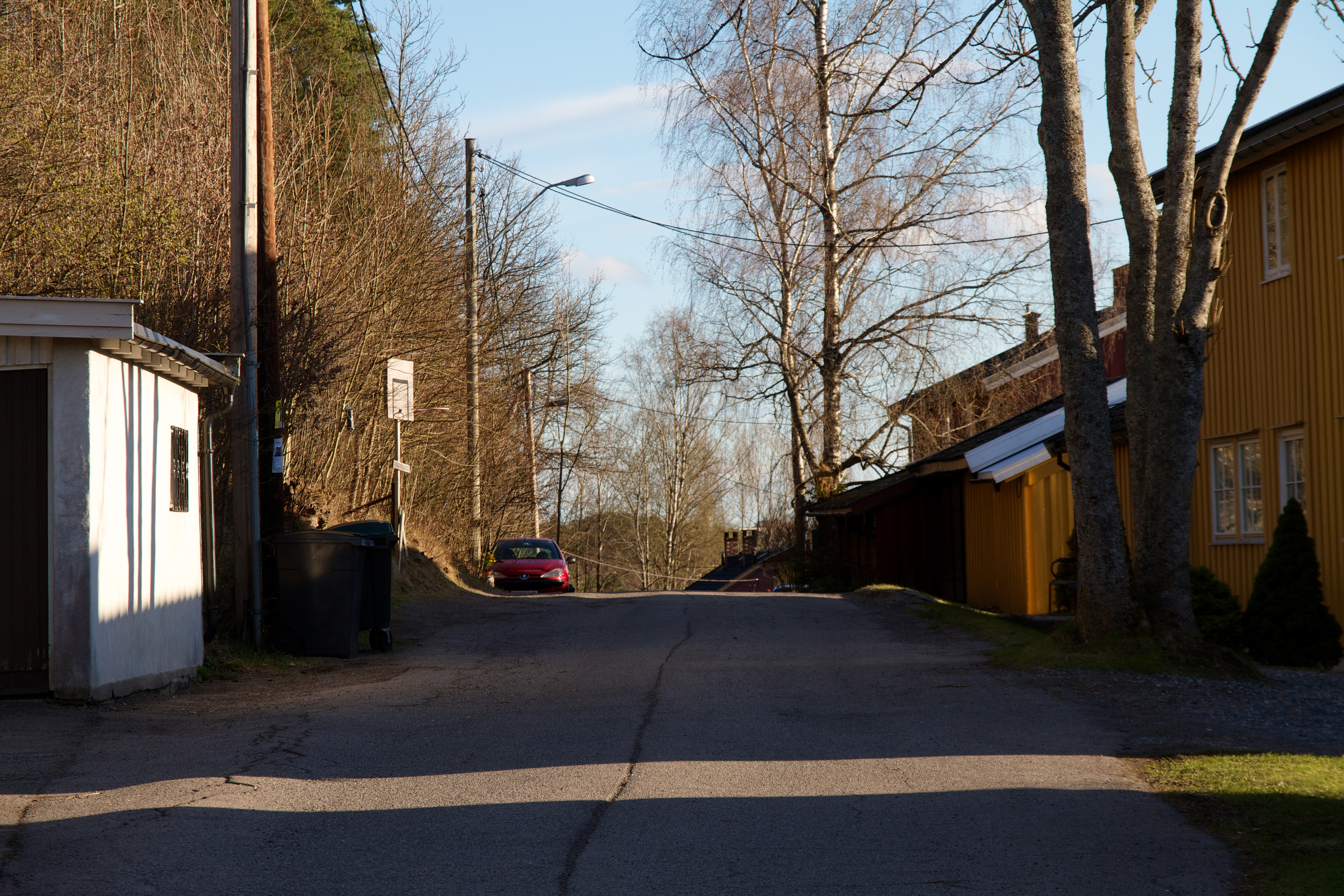 Jøranstien på Ulsrud i Oslo.